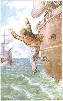 Illustration zu Friedrich Gerstäcker: Fritz Wildaus Abenteuer zu Wasser und zu Lande, illustrirt von Herbert König. Zweite Auflage. Verlag von Braun & Schneider. München o.J. (1879).